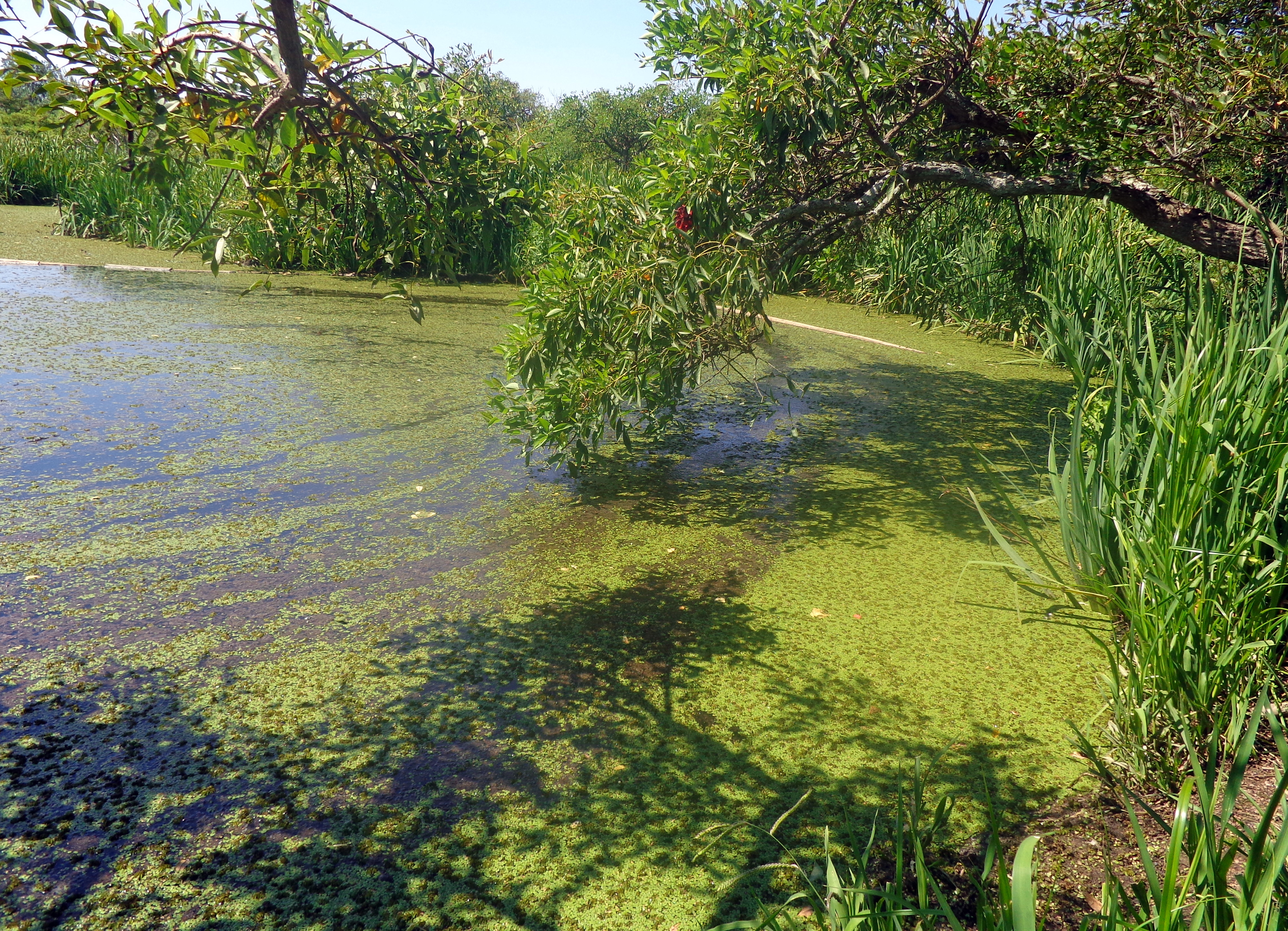 En la costa del Río de la Plata de Acassuso, en el partido de San Isidro, sobre el camino de la Ribera, entre la calle Vicente López y las calles Planes y Almafuerte, a la altura de la Avenida del Libertador 15400.